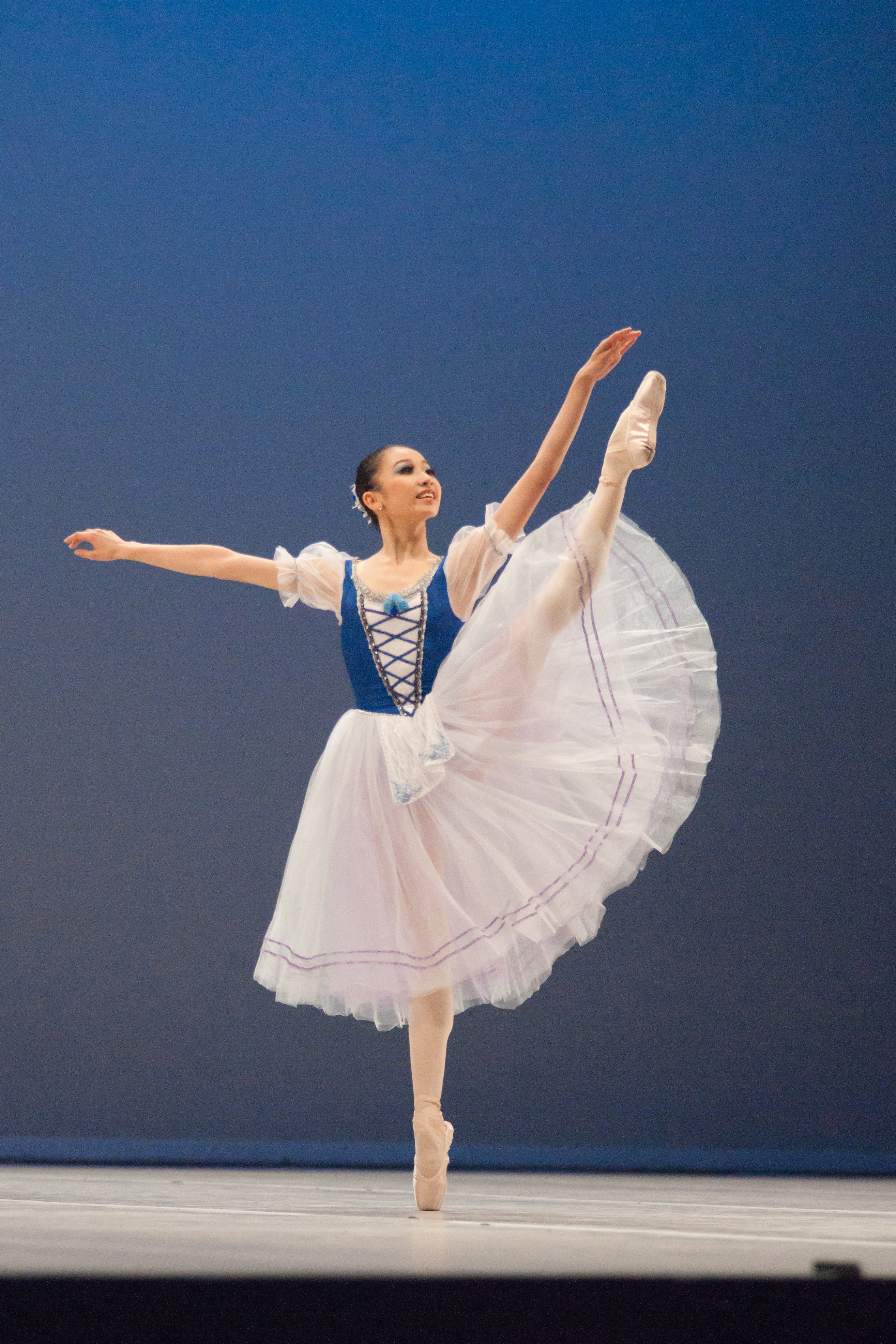 Variation extraite de Coppélia au Prix de Lausanne 2010.